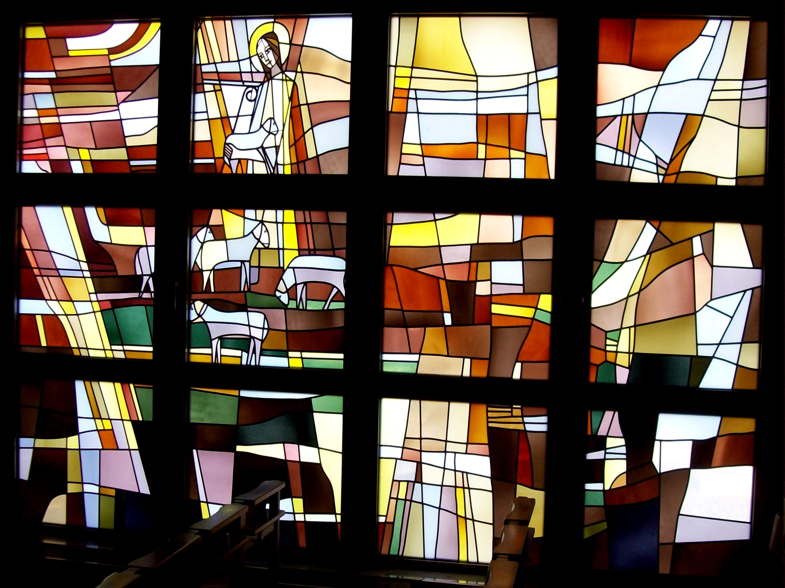 Buntglasfenster Jesus, der Gute Hirte in der Kapelle im Klinikum Aschaffenburg, geschaffen 1989 von Helmut Albert